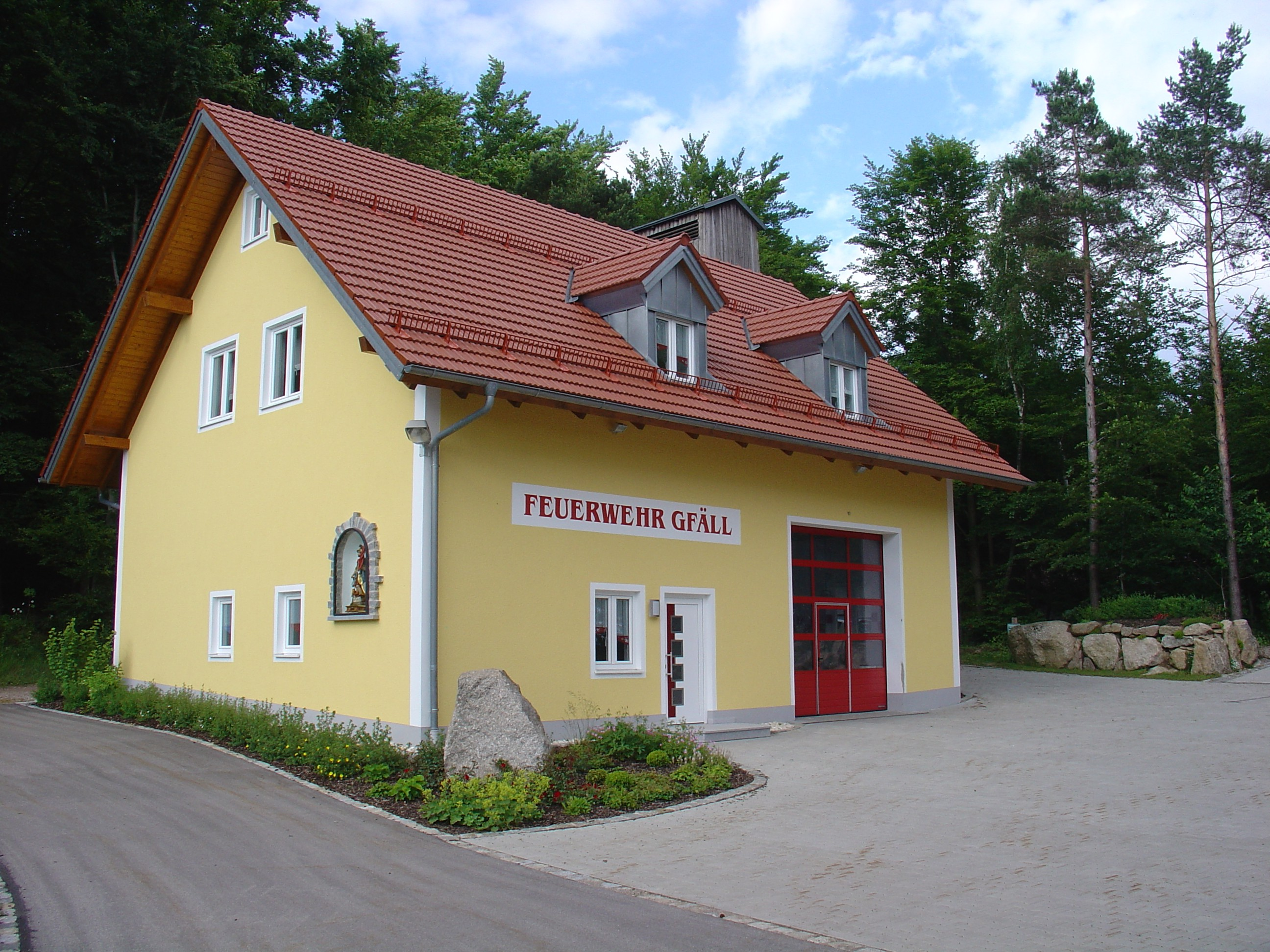 3. Gerätehaus